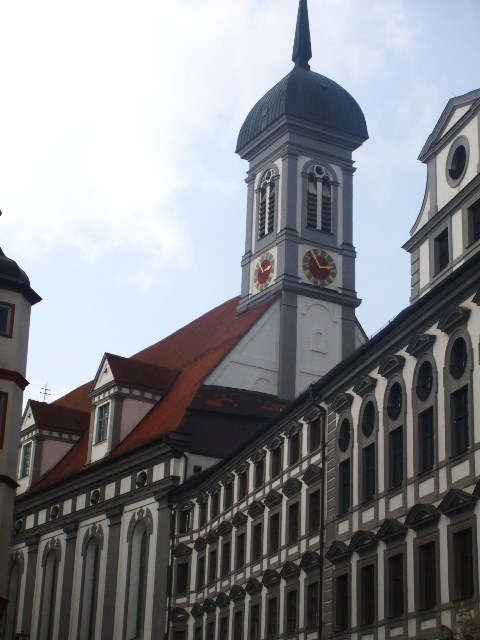 Studienkirche Mariä Himmelfahrt, Dillingen an der Donau Außenansicht